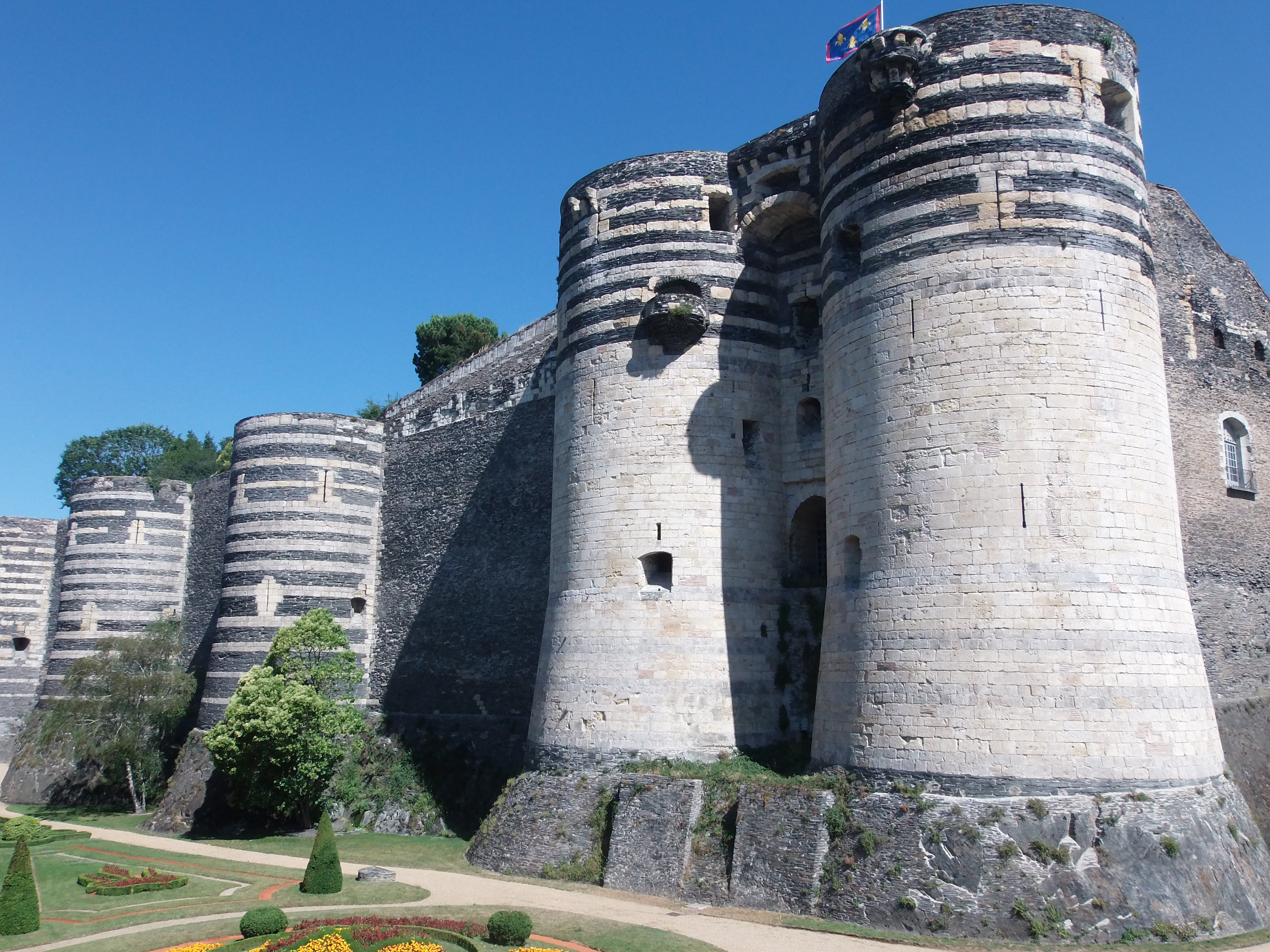 Le château d'Angers (Maine-et-Loire, France), aussi appelé château des ducs d'Anjou, des XIIIe-XVIe siècles. Prise de vue de juillet 2015.